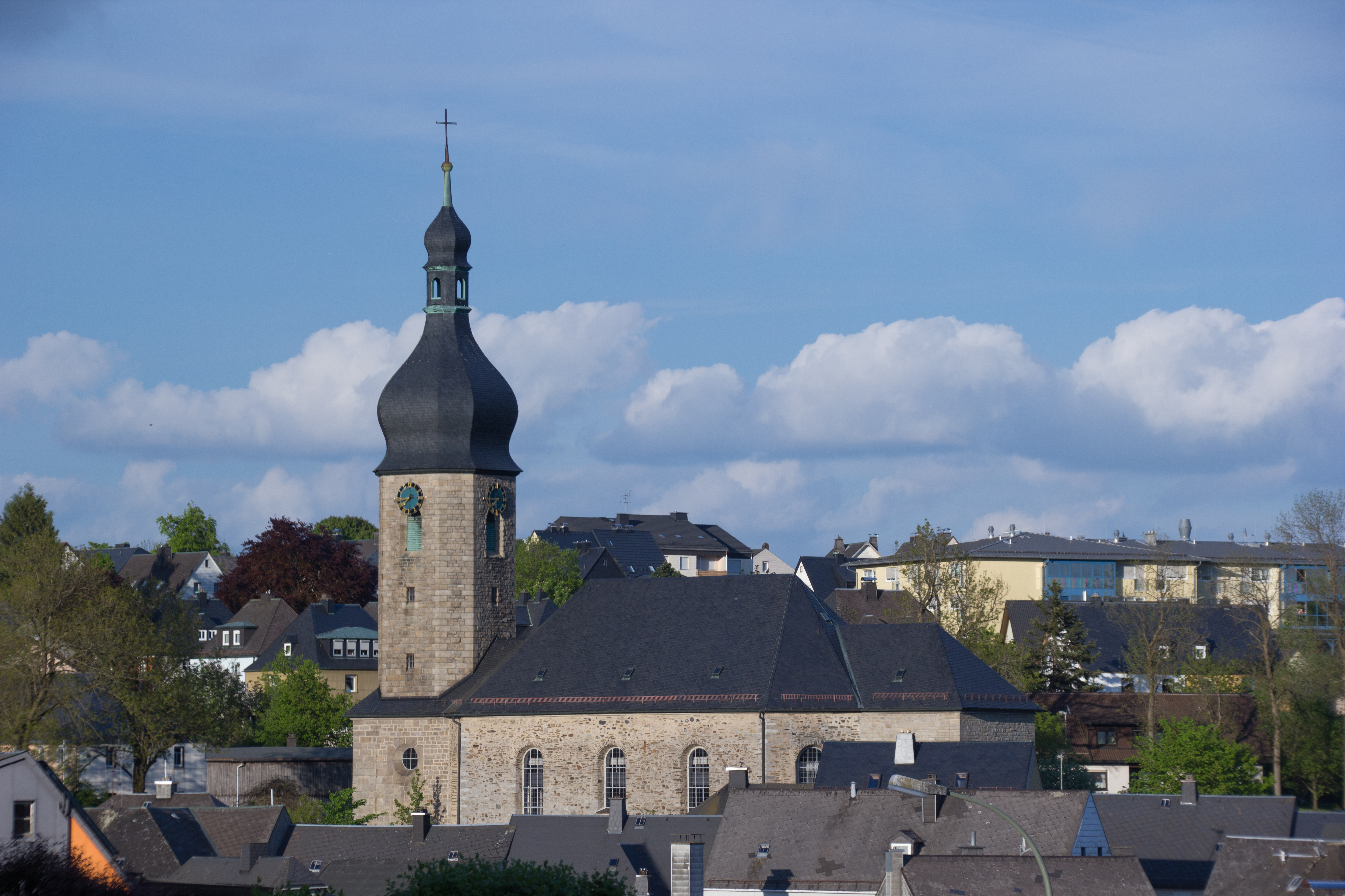 Evangelisch-lutherische Pfarrkirche, Christuskirche in Schwarzenbach am Wald